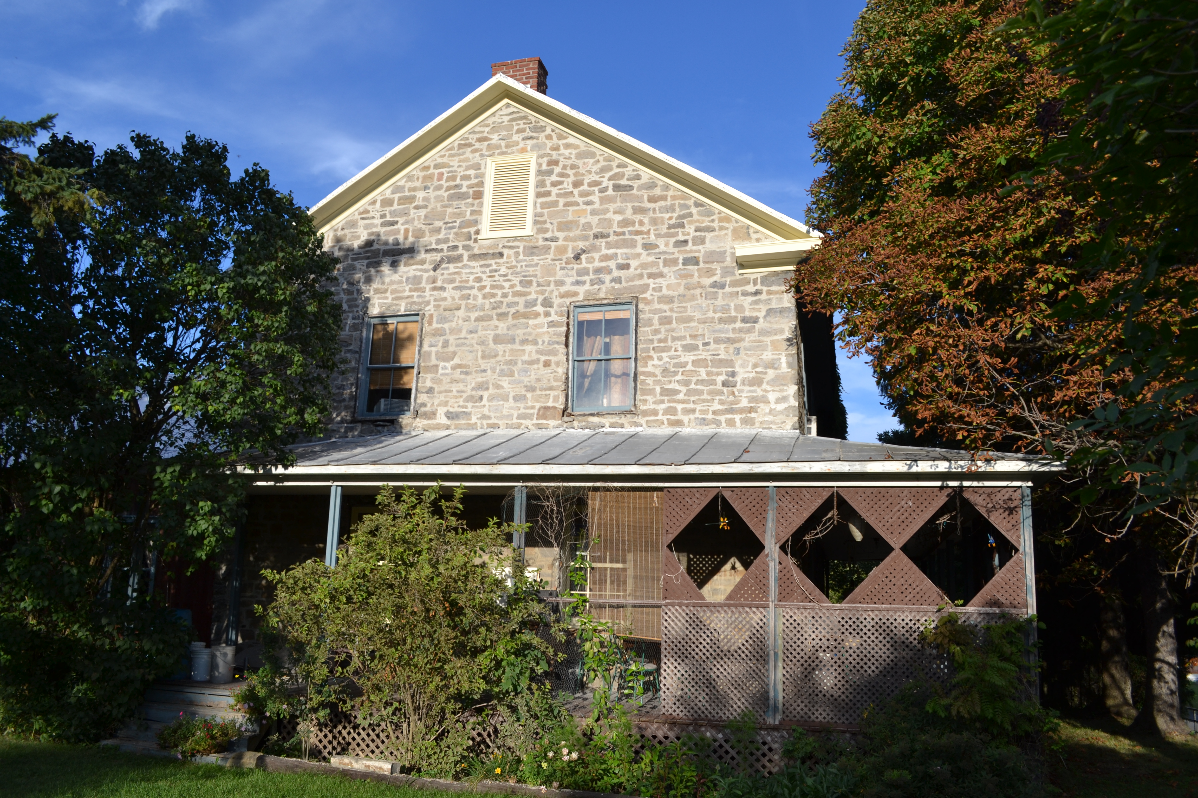 La maison du 48, rue Van Vliet, située à Lacolle au Québec est une résidence néoclassique datant de la première moitié du XIXe siècle.